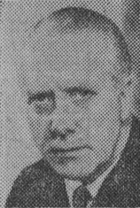 Arktiekten och möbelformgivaren Bertil Fridhagen